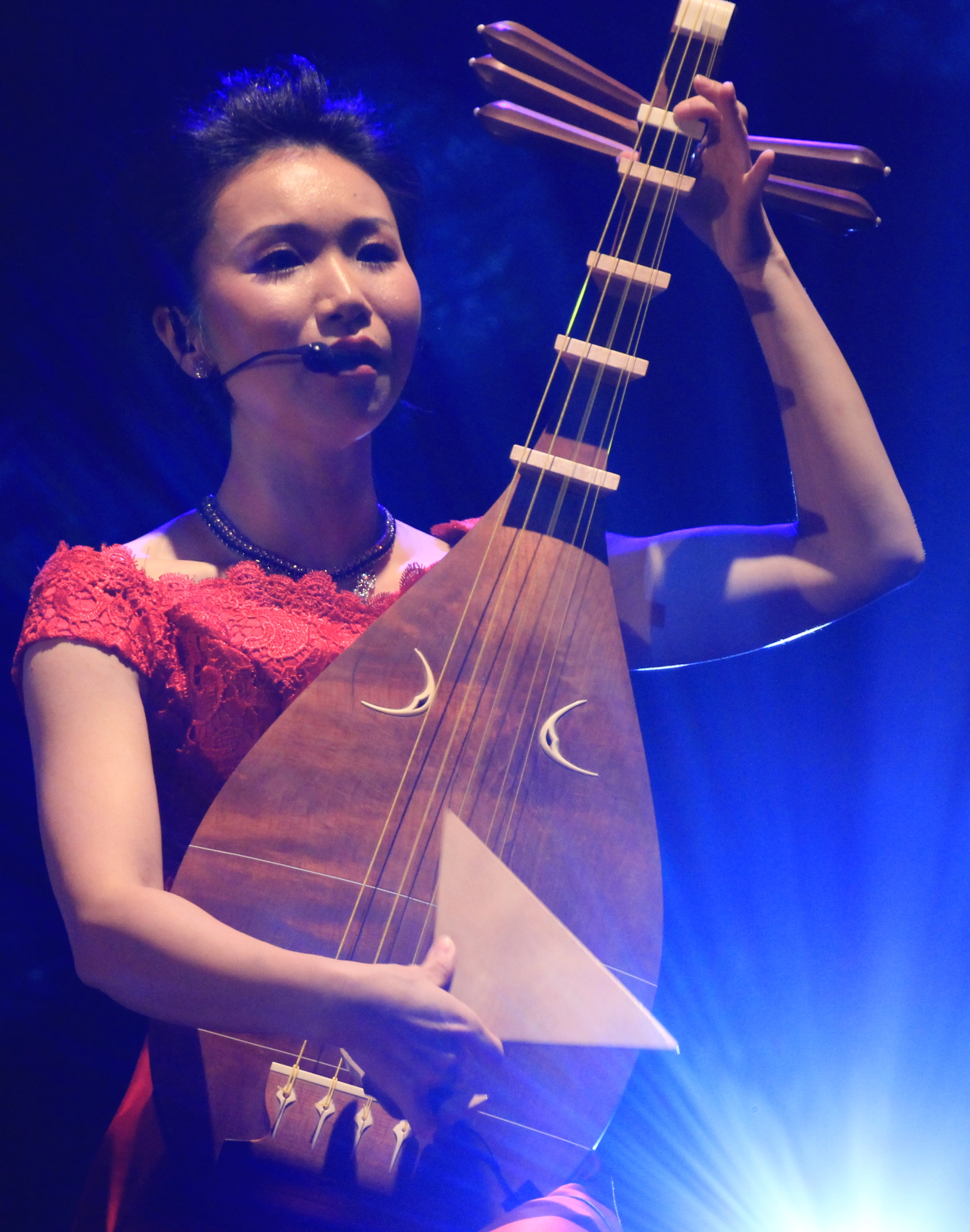 長須与佳